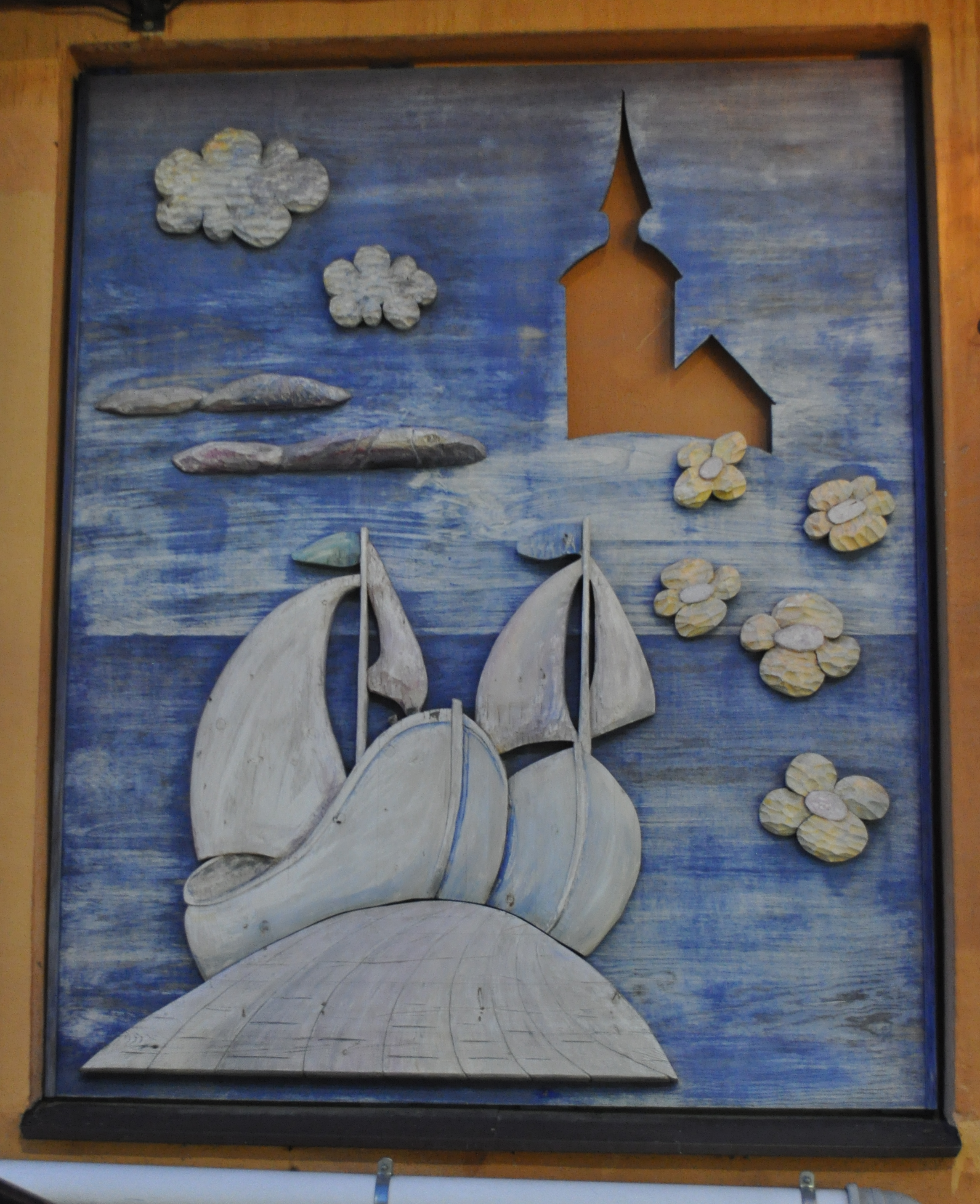 Centrumsmycket av Hans Polmar. Nynäshamn It is not clear whether freedom of panorama applies to this image. This is a depiction of a work of art in Sweden. The depicted work is believed to be protected by copyright. According to Article 24 of the Swedish copyright act, "Works of art may be depicted if they are permanently placed on or at a public place outdoors. Buildings may be freely depicted." It has been widely accepted that this provision made distribution of depictions such as this one legal. On 4 April 2016, however, the Supreme Court of Sweden issued a statement that Article 24 does not extend to publication in online repositories, and on 6 July 2017, a lower court ruled that linking to depictions of copyrighted artworks hosted on Commons constitutes copyright infringement. See COM:CRT/Sweden#Freedom of panorama for more information. The implications of these decisions on Commons' ability to continue to distribute this and other depictions like it are currently under analysis. Reusing or linking to this file may have legal consequences. You are solely responsible for ensuring that you do not infringe the copyright belonging to someone else. See our general disclaimer for more information.